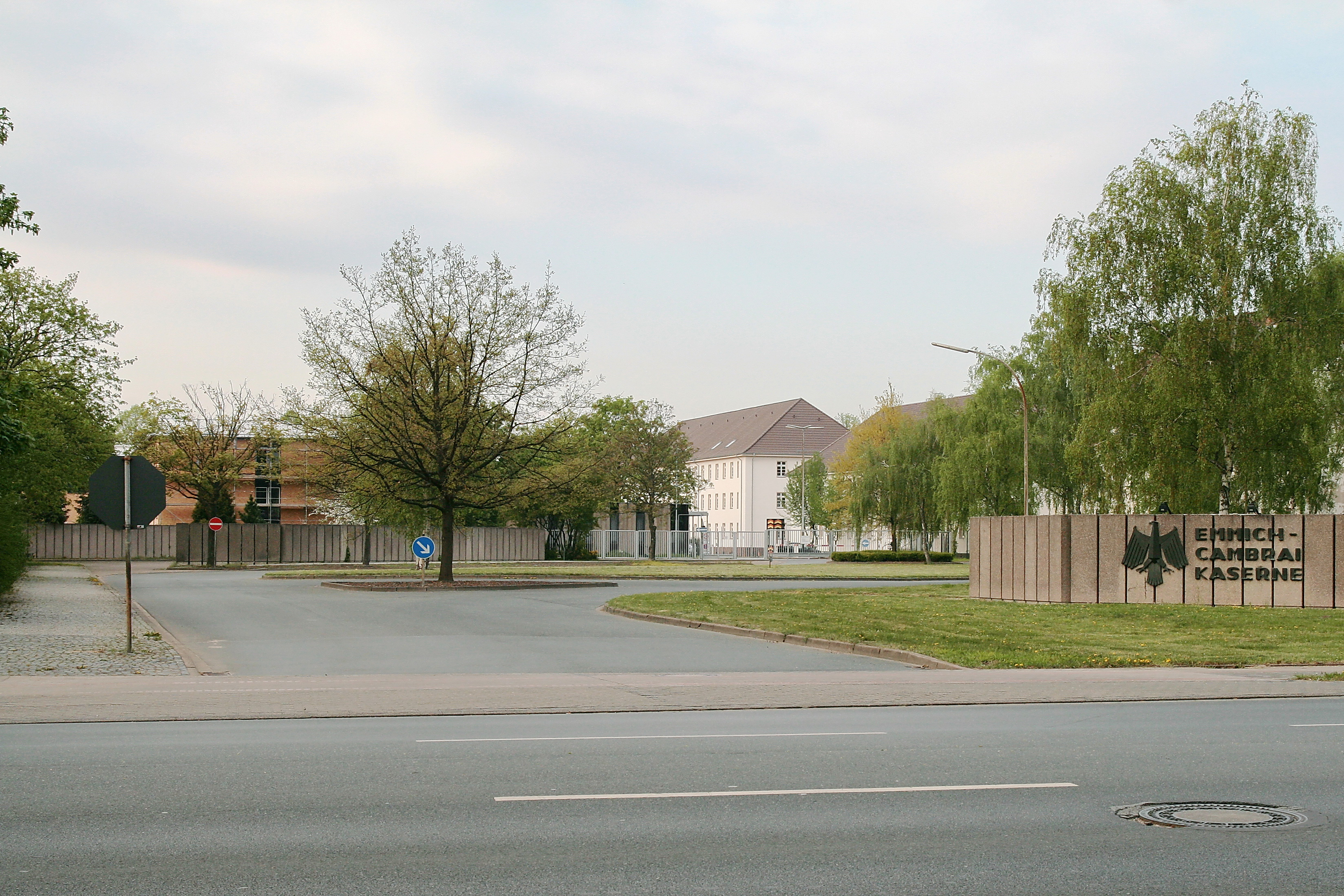 Emmich-Cambrai Kaserne (Hannover), Niedersachsen, Deutschland